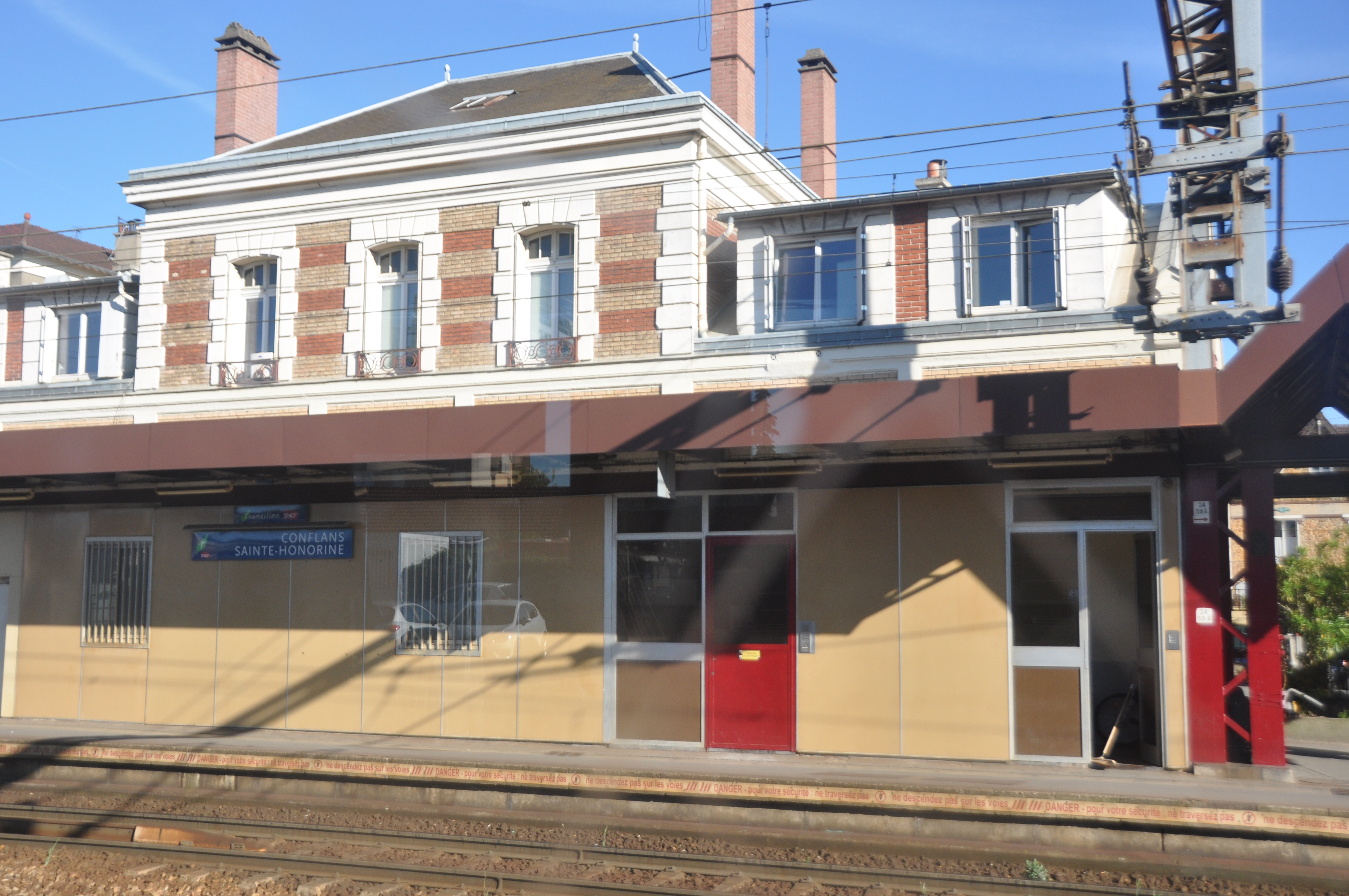 Vue en gros plan du bâtiment voyageur de la gare de Conflans-Sainte-Honorine, depuis la ligne de Paris-Saint-Lazare à Mantes-Station par Conflans-Sainte-Honorine, vers Paris.